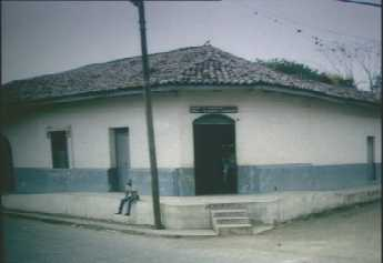 Casa natal de Augusto César Sandino en Niquinohomo, Masaya Nicaragua América Central